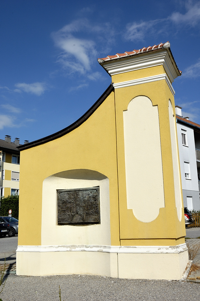 Tor des ehem. Schlosses Angern